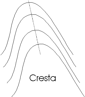 Esquema de una cresta con curvas de nivel.